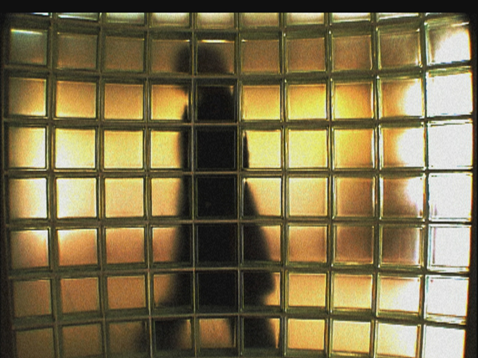 מתוך סרטה של טליה פינקל כוסות רוח לאבא, 2008